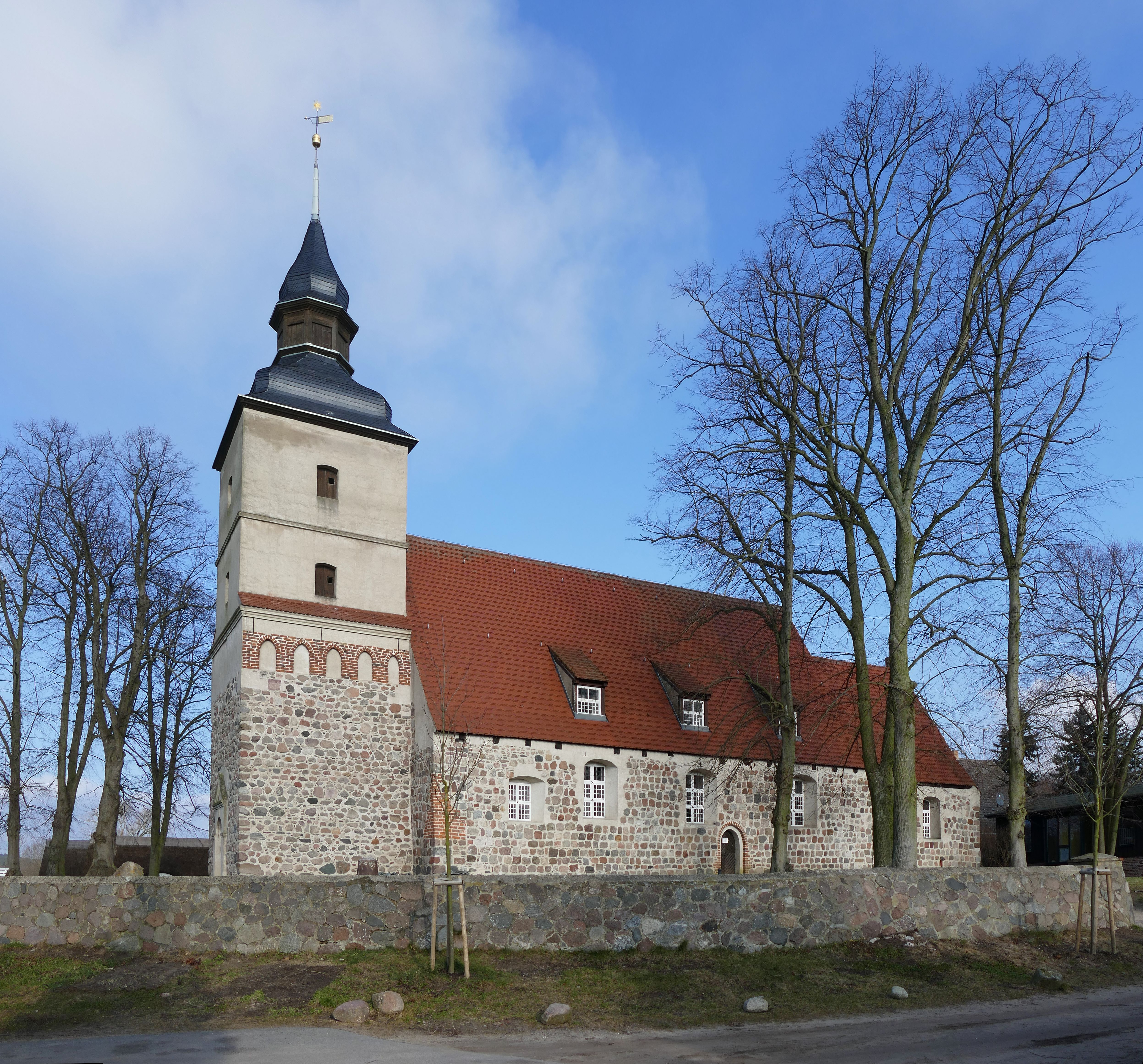 St. Petri-Kirche in Benz auf Usedom